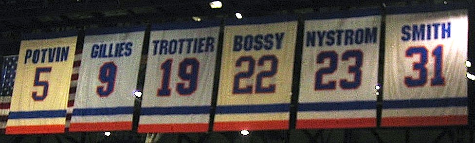 Die Banner der gesperrten Nummern der Eishockeymannschaft New York Islanders